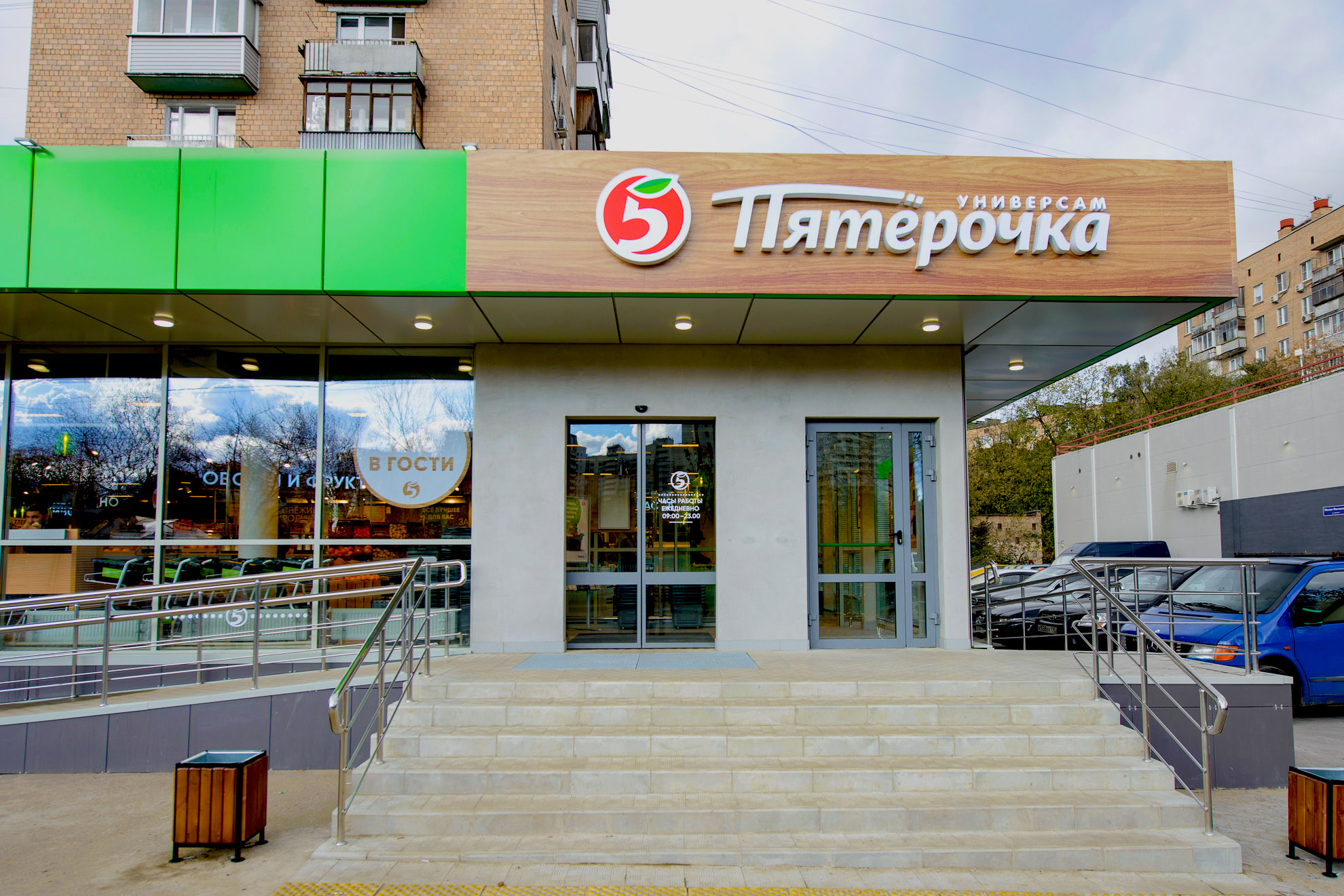 С декабря 2019 года все универсамы «Пятёрочка» открываются в новой концепции и с обновлённым дизайном. Появились пекарня, кофе-автомат, аппарат со свежевыжатыми соками, кассы самообслуживания разработки X5 Retail Group, зона для перекуса и зарядки гаджетов, покупательские корзины из переработанного пластика, многоразовые сумки из спанбонда и тканевые, бумажные пакеты и мешочки для фруктов и овощей, электронные ценники.